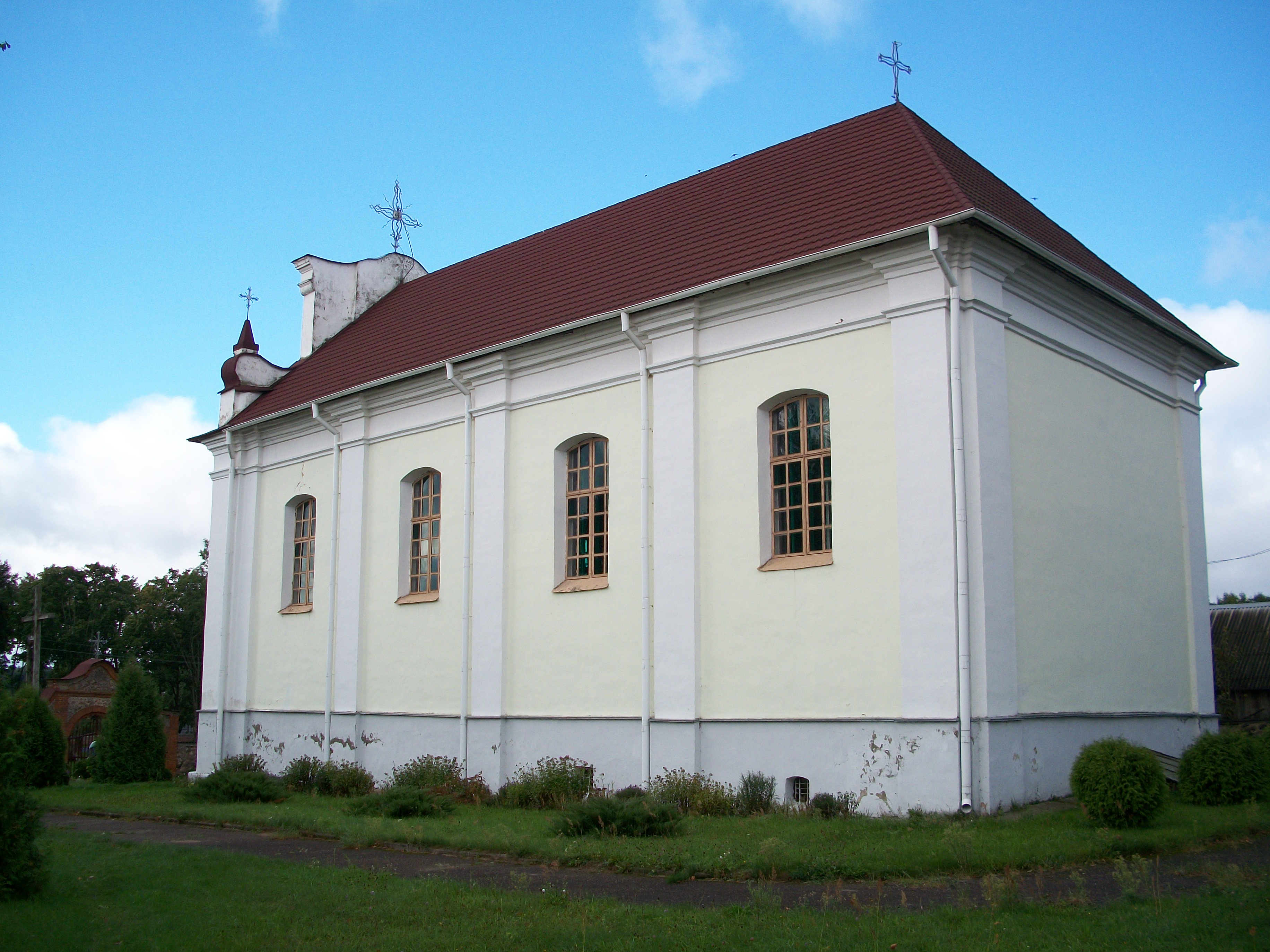 Беларуская (тарашкевіца): Касьцёл езуітаў з брамай і агароджай. в. Касьцяневічы This is a photo of Belarusian heritage monument. Reference number: 612Г000123 ( WLM)